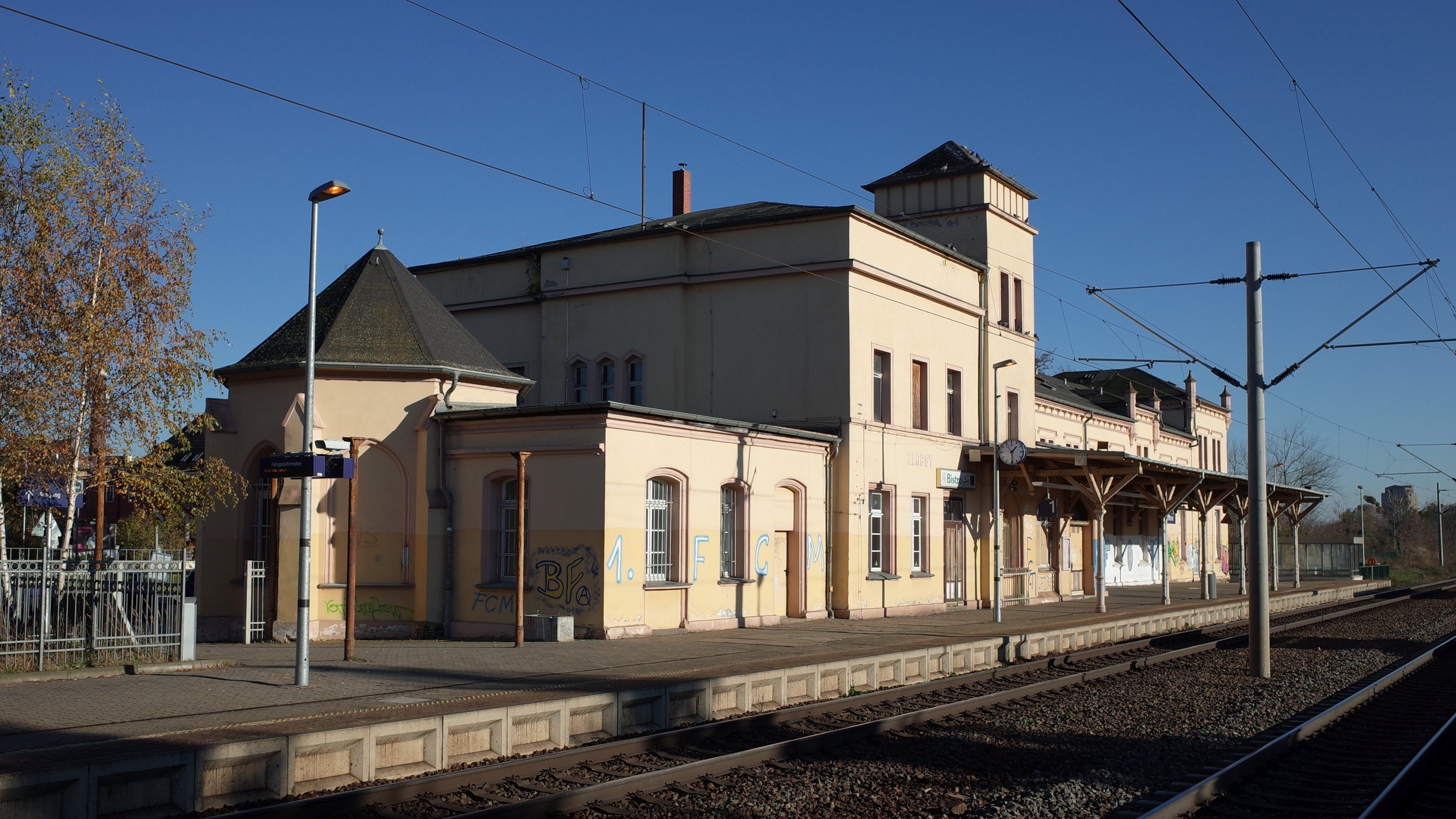 Stadt Zerbst/Anhalt. Bahnhof Zerbst, Empfangsgebäude (Baudenkmal im Denkmalverzeichniss Sachsen-Anhalt, Erfassungsnummer: 094 41313 000 000 000 000 [1])